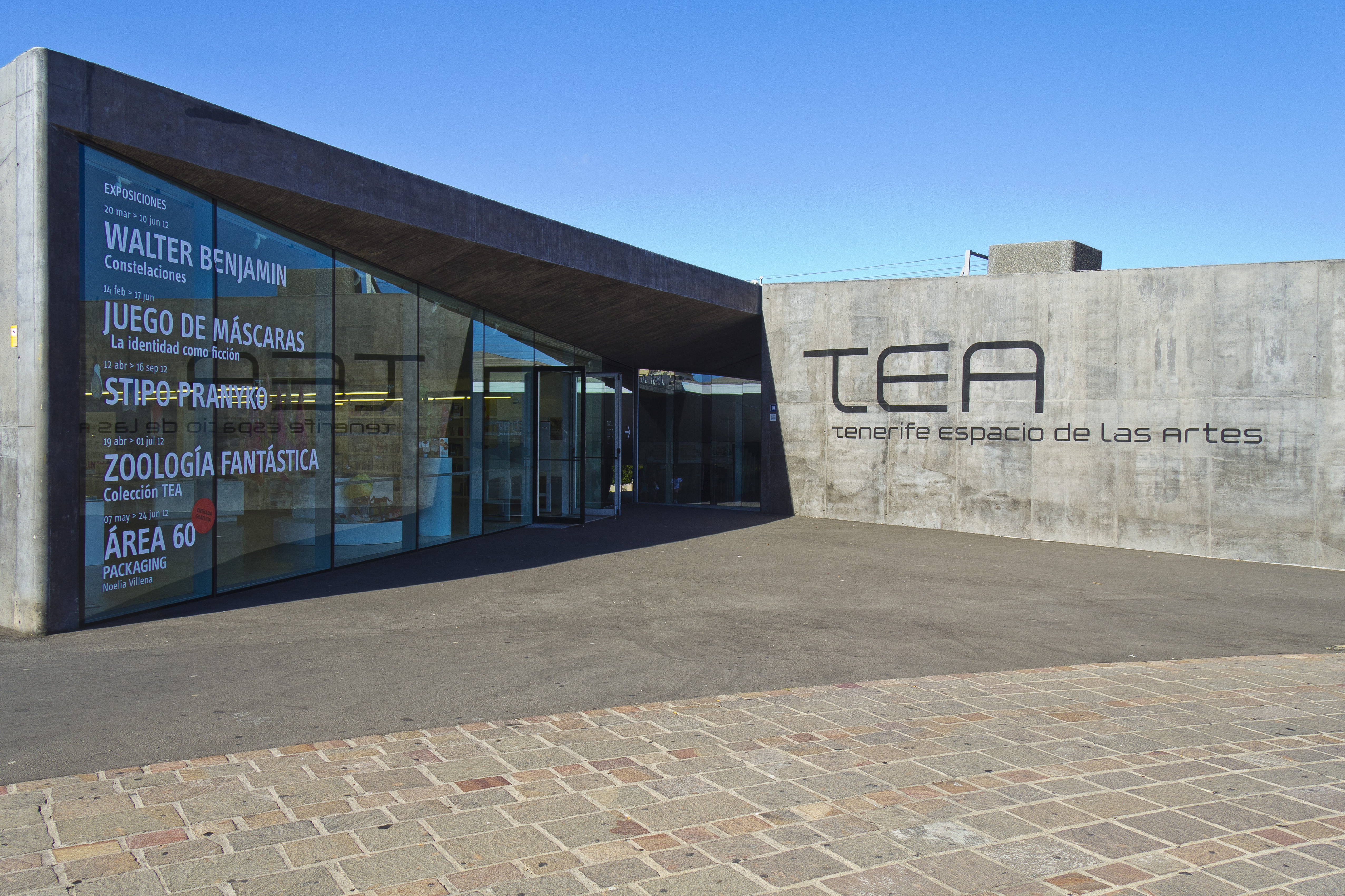 Das Gebäude des TEA (Tenerife Espacio de las Artes) in Santa Cruz de Tenerife, Nordeingang zum Innenhof und dem Durchgang zum Barrio Concepción.